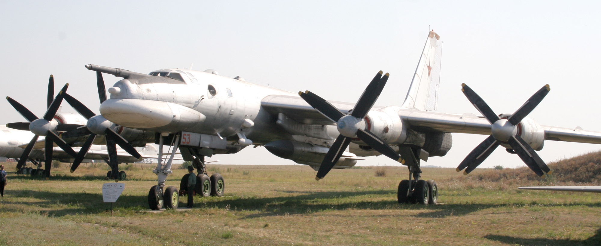 Самолёт Ту-95К-22 бортовой номер 53. Экспонат музея дальней авиации на авиабазе Энгельс